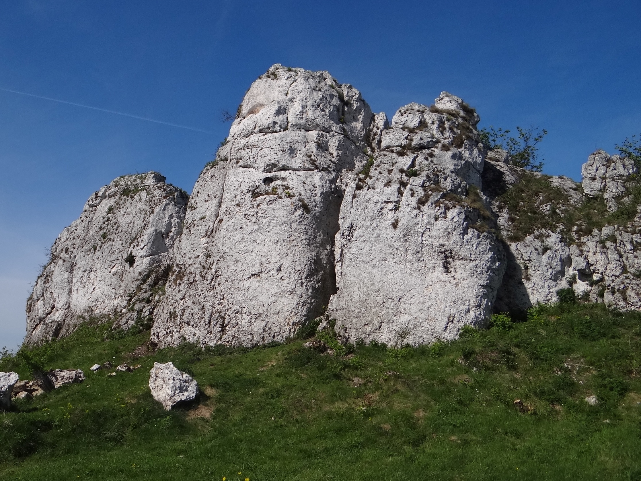 Skała Mały Mur w Jerzmanowicach. Widok ze Skały 502